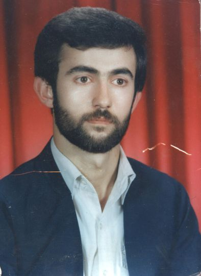 کوردی: مارف ئاغایی:شاعیری نوێخوازی شیعری کوردی لە کوردستانی ئێران